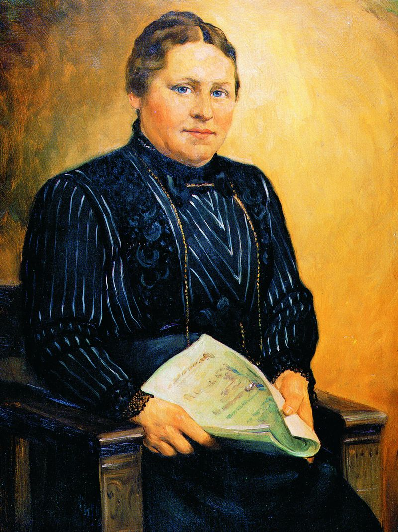 Wilhelmine_Seppelfricke